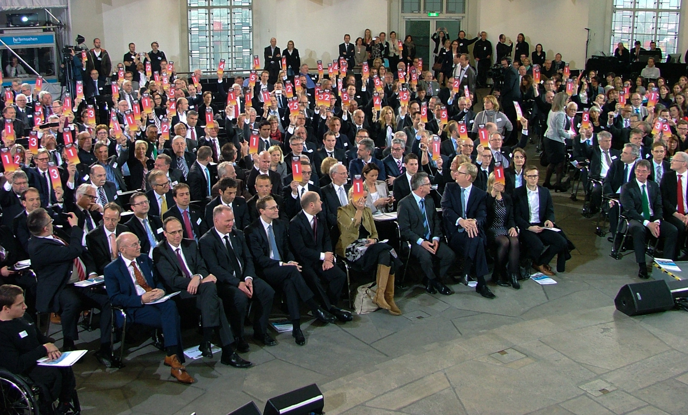 11. Mitgliederversammlung DOSB in der Frankfurter Paulskirche. Die DOSB-Mitgliedsorganisationen stimmte in einer außerordentlichen Mitgliederversammlung einstimmig dafür, dass Deutschland mit der Freien und Hansestadt Hamburg sich um die Olympischen und Paralympischen Spiele 2024 und gegebenfalls 2028 bewirbt.